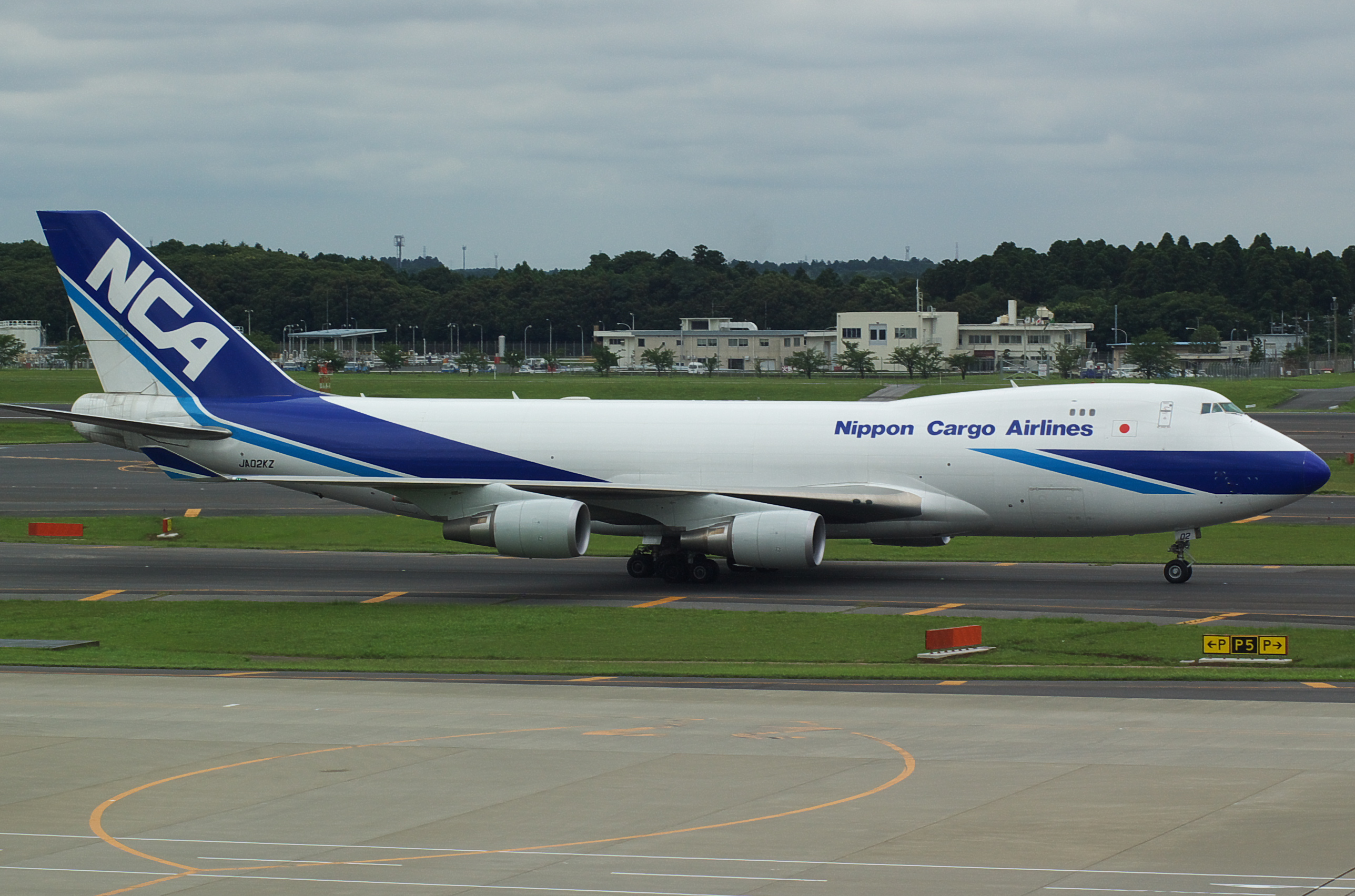 2007年7月19日 成田空港第一ターミナル展望デッキにて撮影 NCA 747-400F JA02KZ